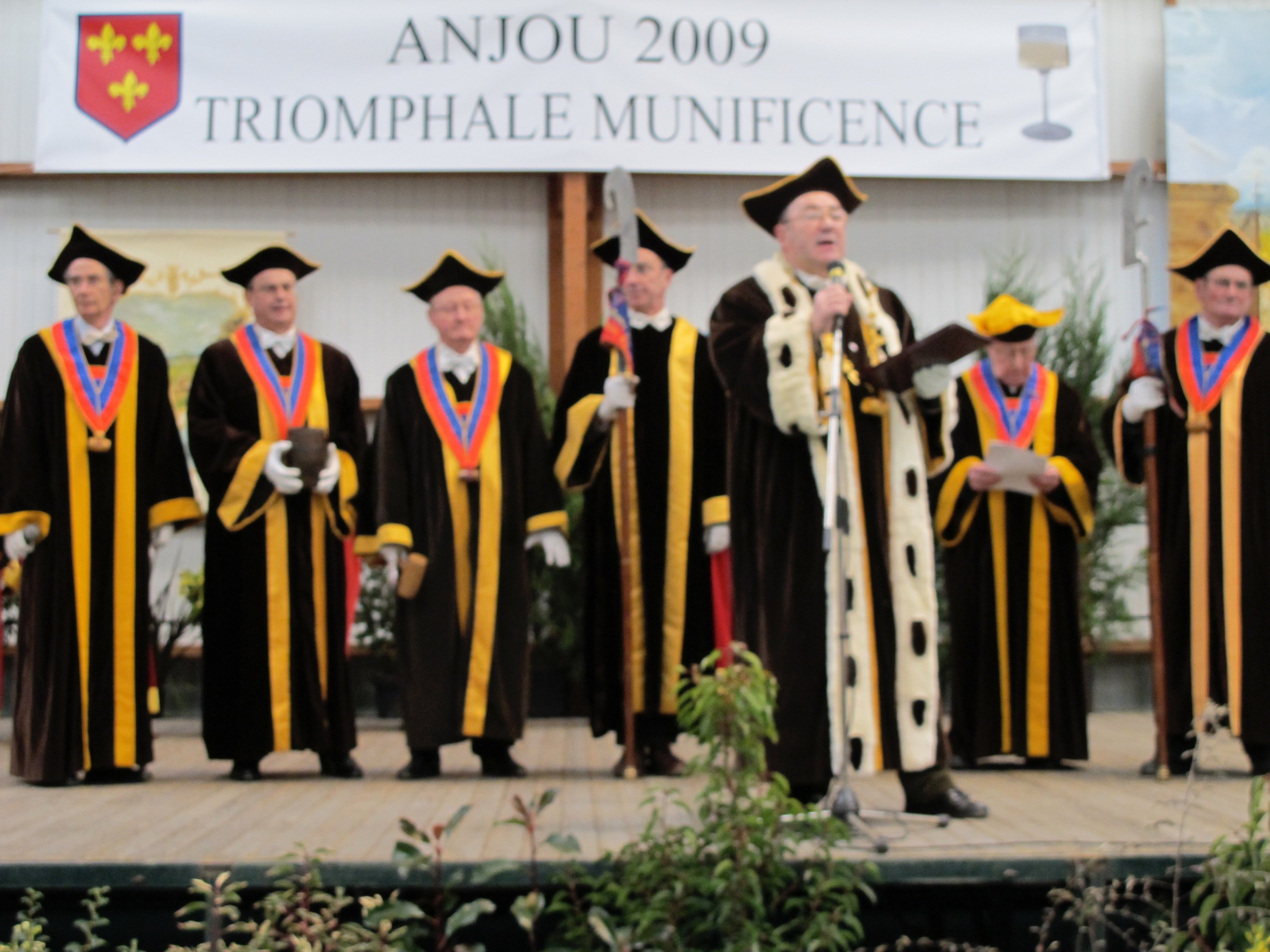 Tenue des Sacavins